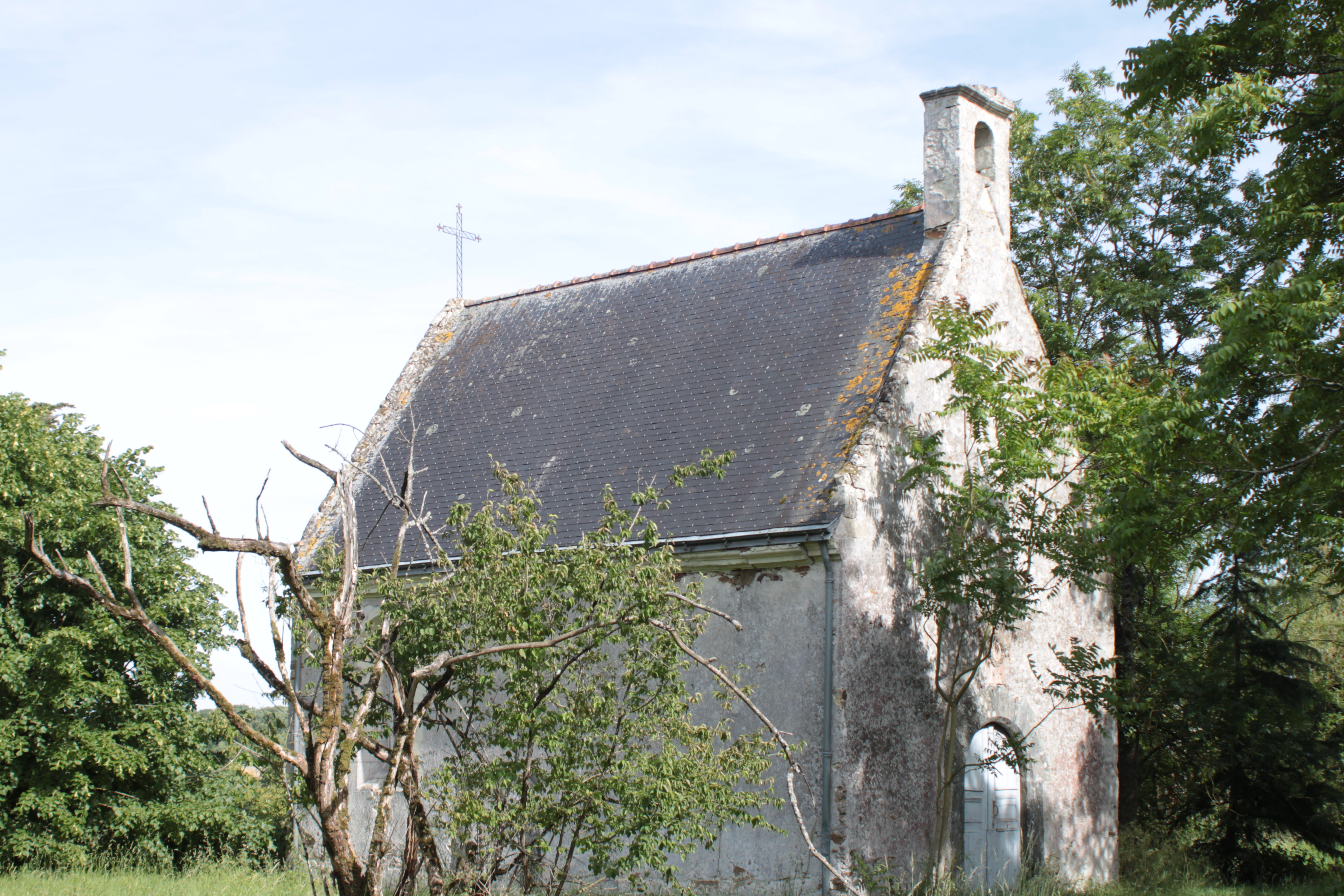 Chapelle du château de la Guibourgère, XVII°, Teillé.